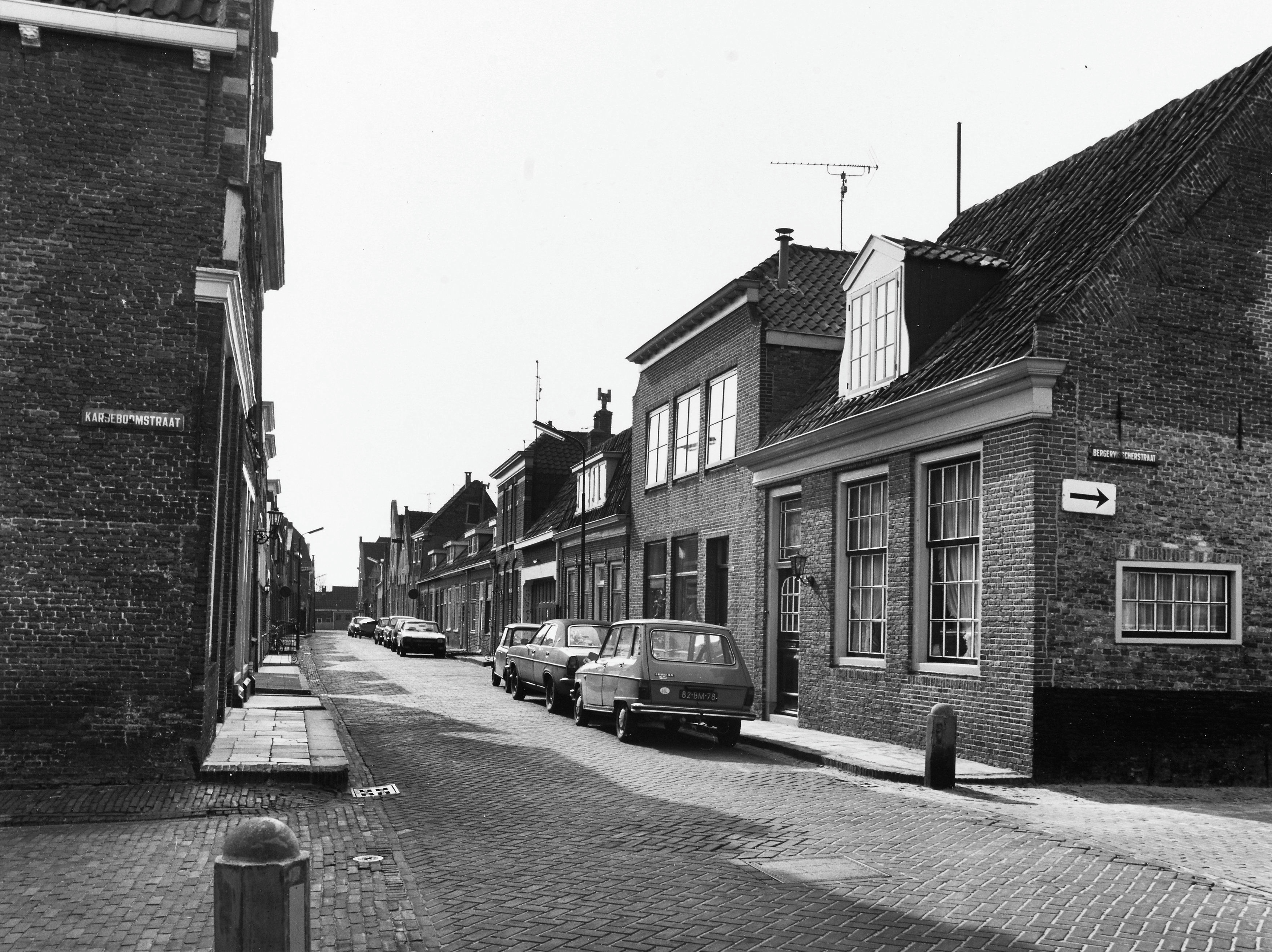 Plattegronden en Overzichten: Breedstraat naar het zuiden (opmerking: Neg. in 2003 verloren door contact met Glucol)